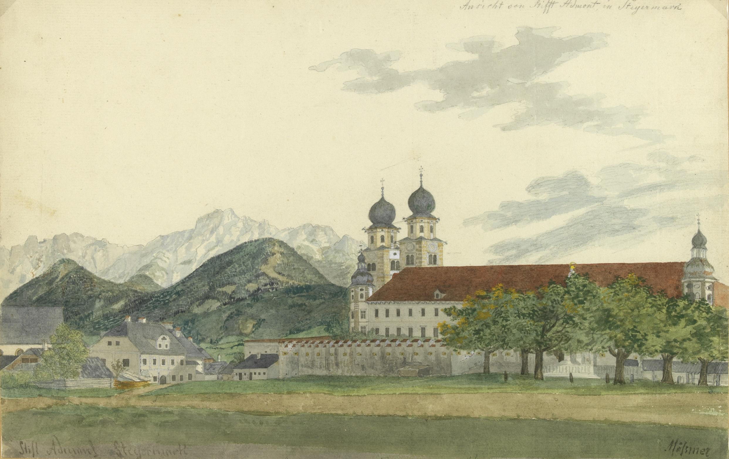 Stift Admont